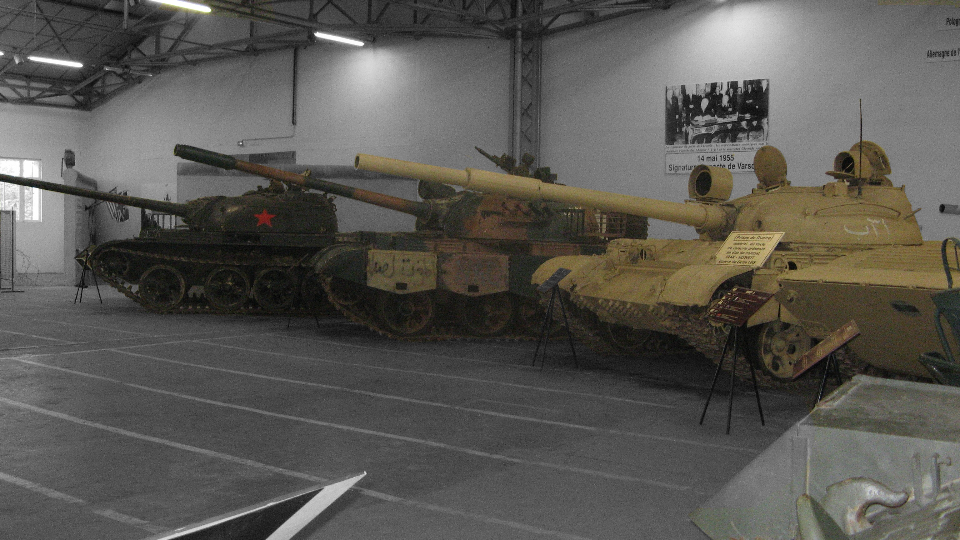 La salle du Pacte de Varsovie du Musée des Blindés de Saumur. De gauche à droite, un T-54 (1952), un Type 69-II , copie chinoise légèrement modifié du T-54/55 et un T-62 (1963). Les deux derniers chars sont des véhicules irakiens capturés en 1991.